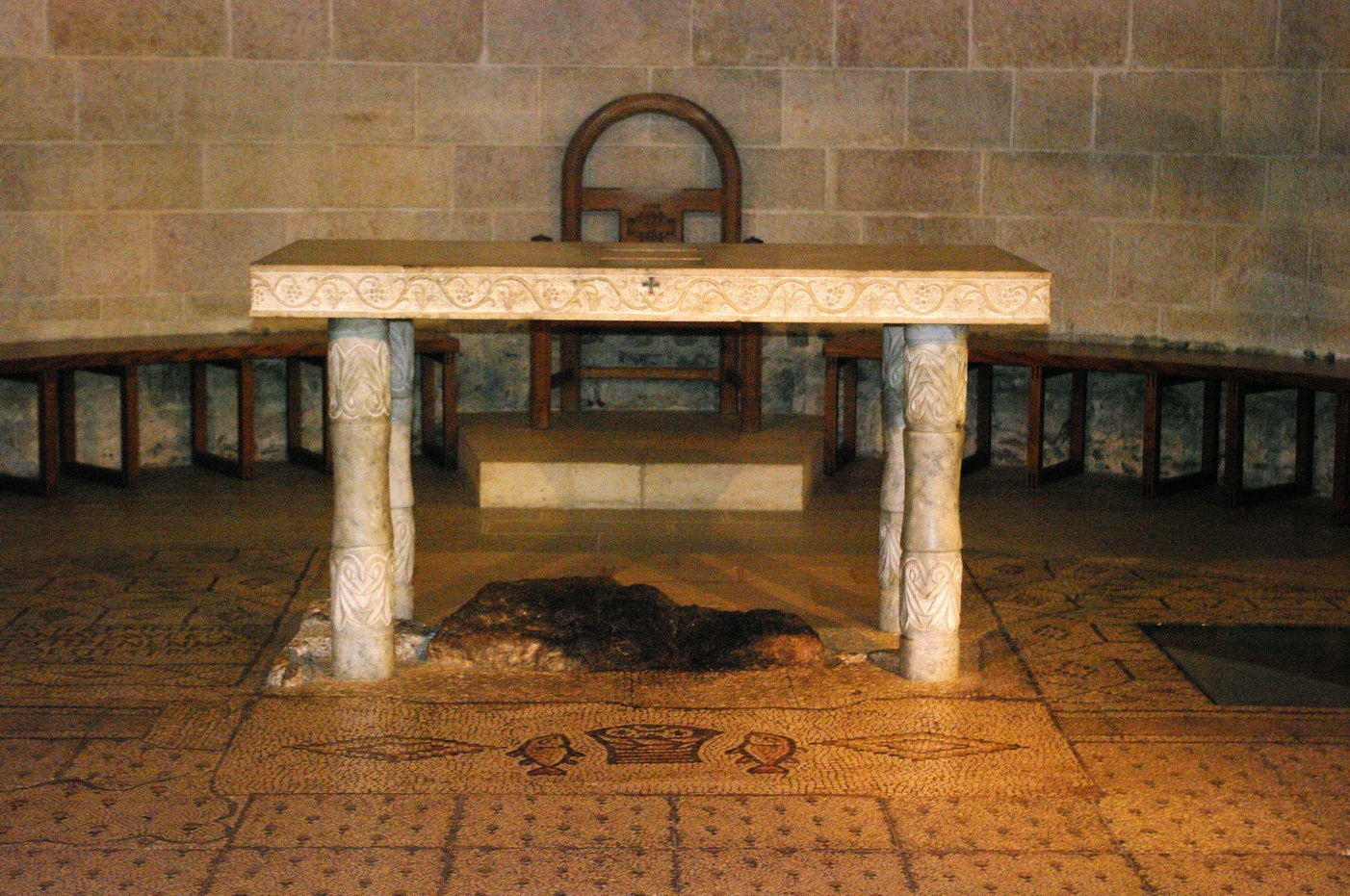 Altar Brotvermehrungskirche